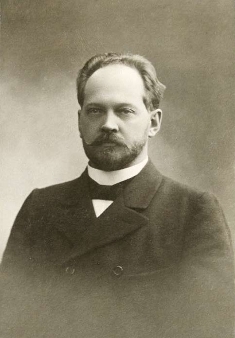 Max (Maximilian) Oker-Blom, Suomen Lääkäriliiton ensimmäinen puheenjohtaja.